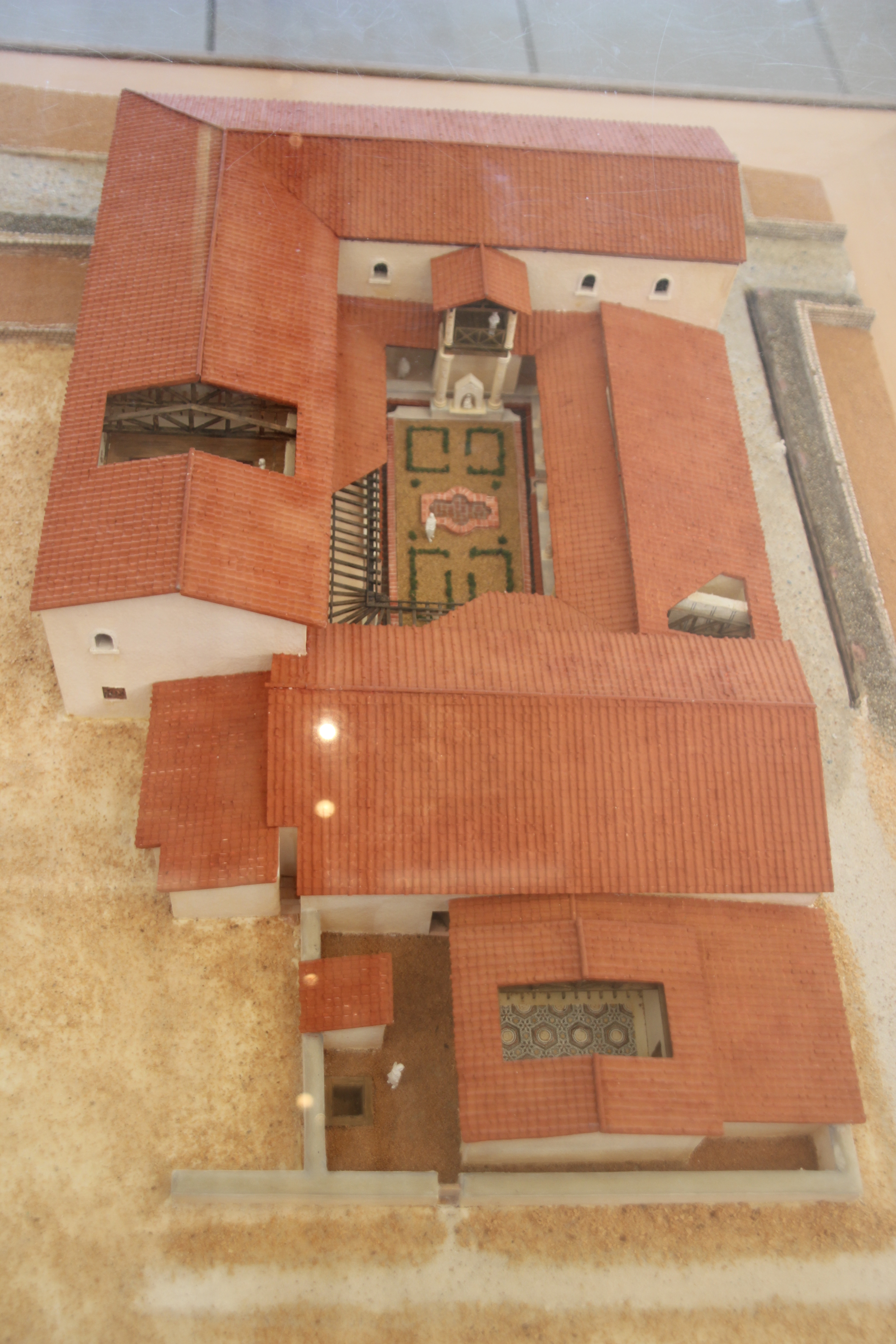 Maison au Grand Péristyle - Vieux-la-Romaine maquette vue aérienne